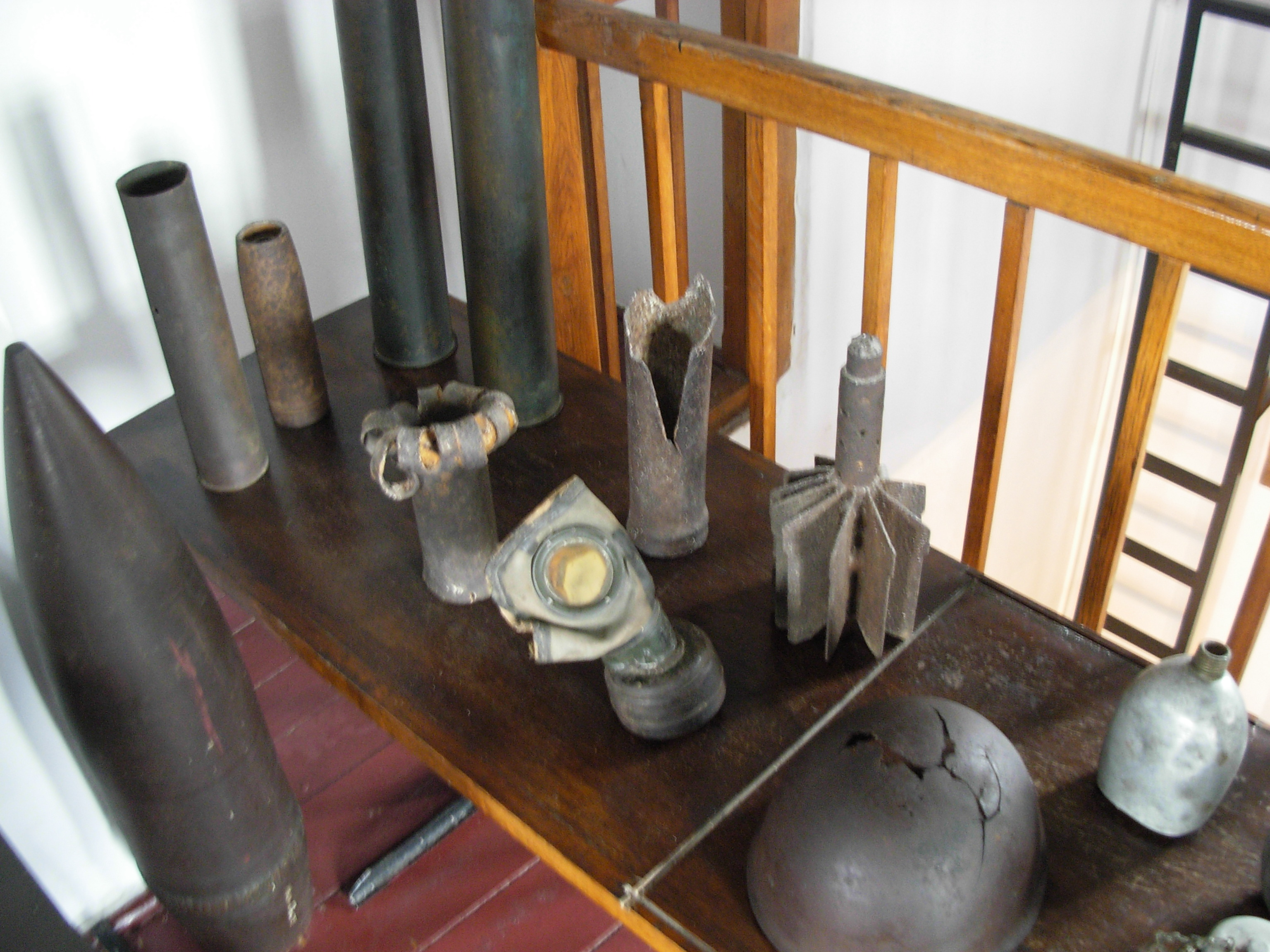 Szydłów